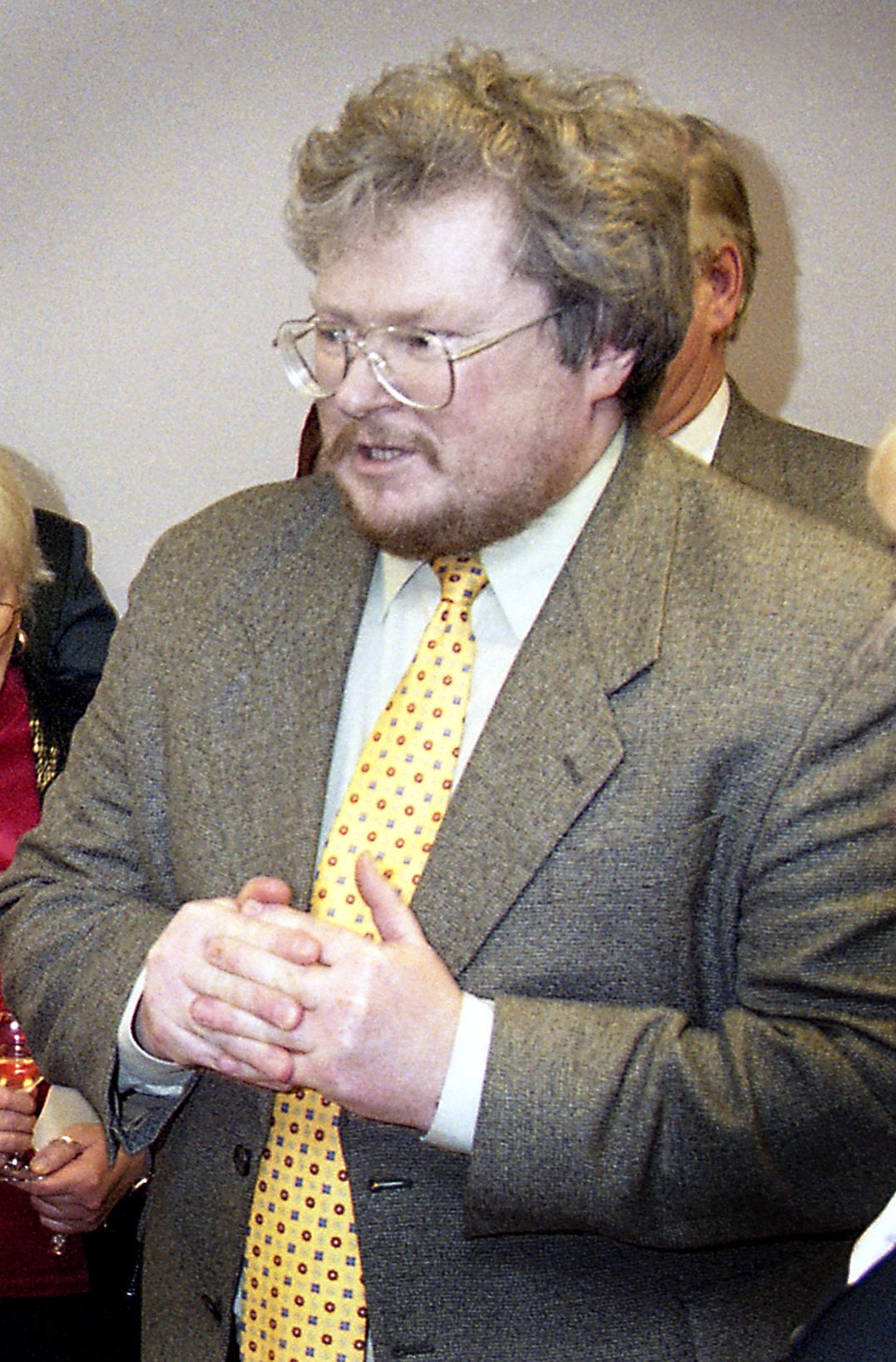 Urmas Dresen, ajaloolane ja muuseumitöötaja 2001